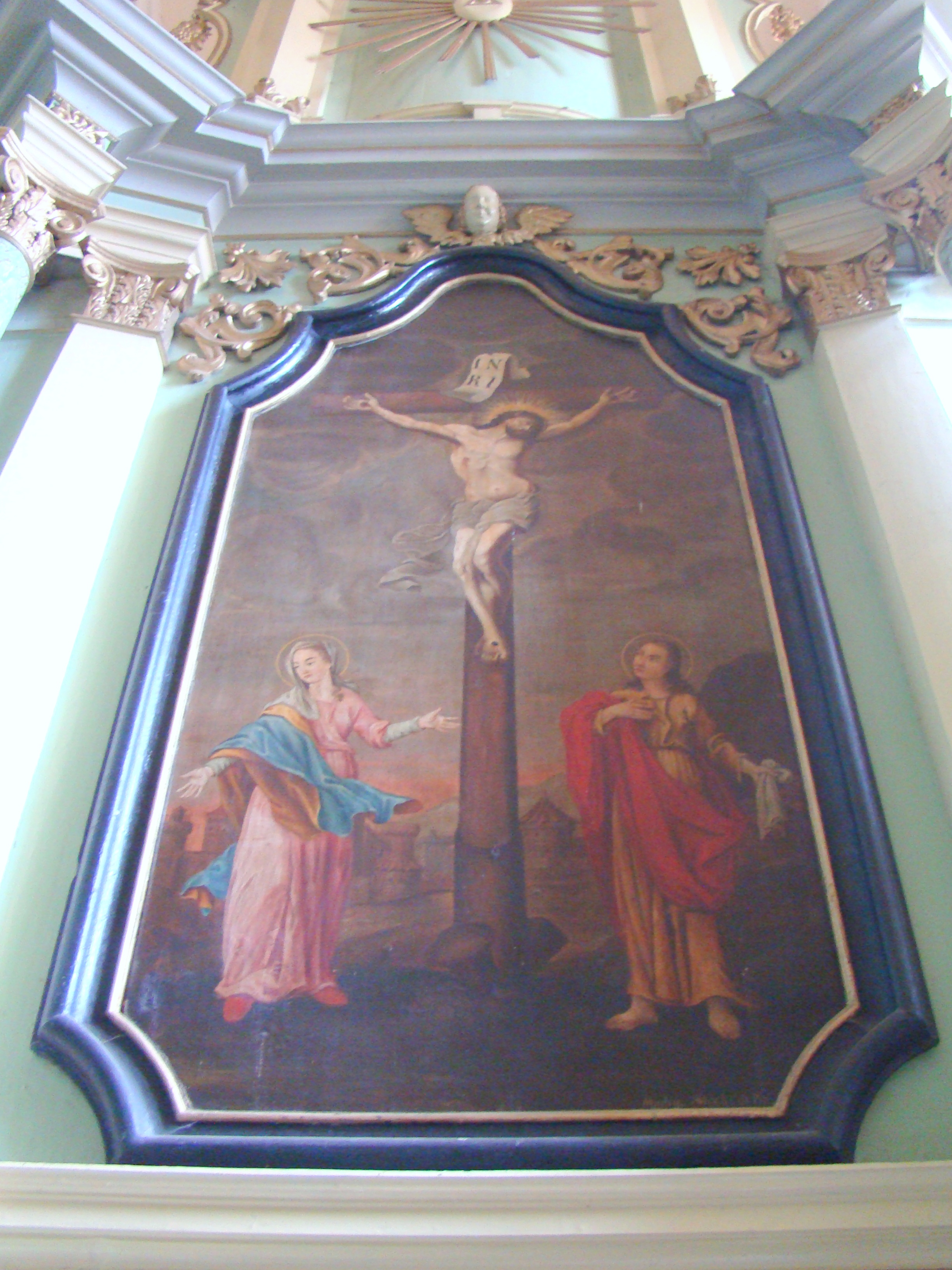 Biserica evanghelică fortificată, sat Șoarș; comuna Șoarș 282 sec. XV - XVI, 1806